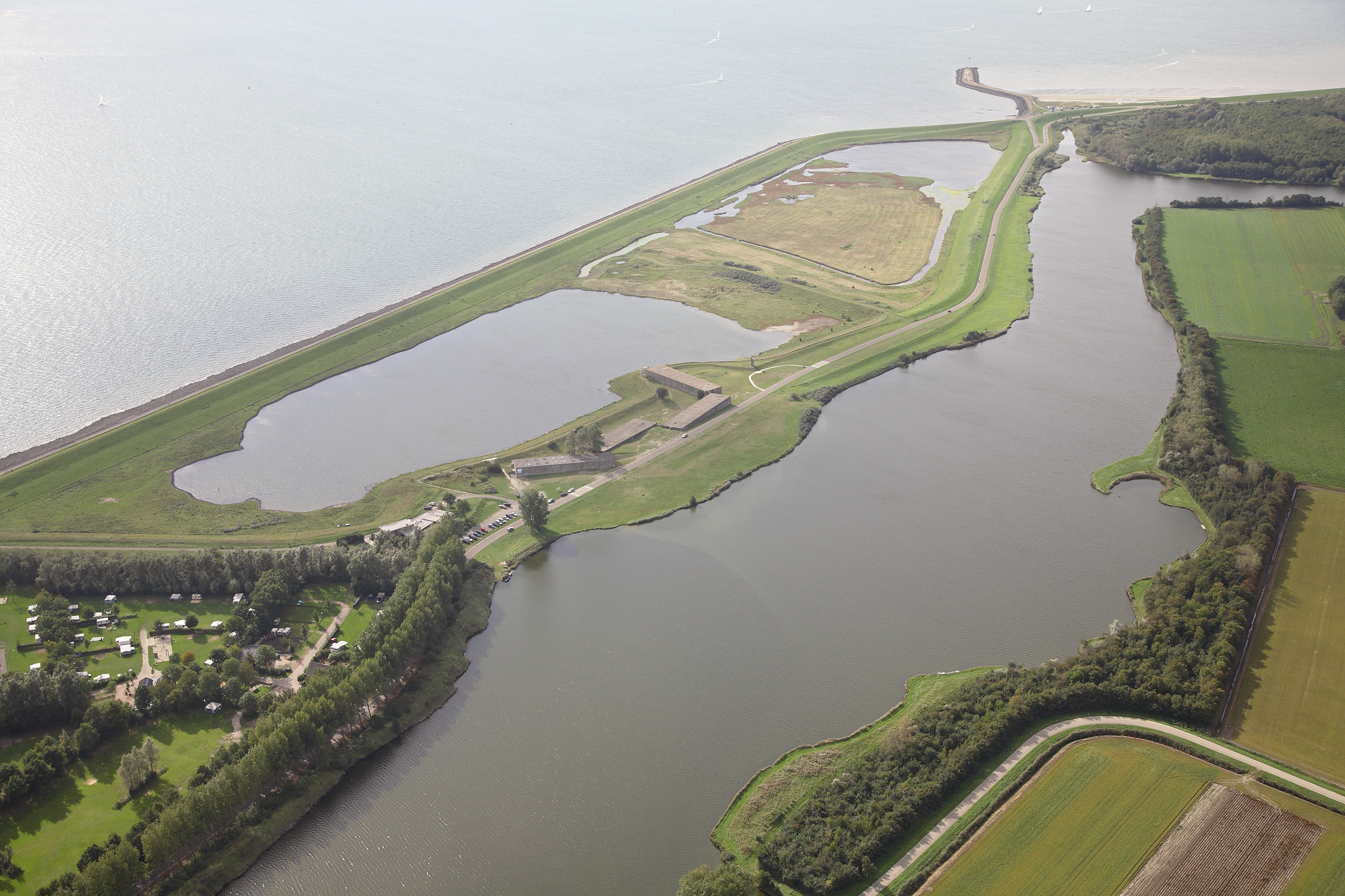 Luchtfoto van het Watersnoodmuseum en omgeving, gevestigd aan de Weg van de Buitenlandse Pers 5 in Ouwerkerk op Schouwen-Duiveland in de provincie Zeeland.